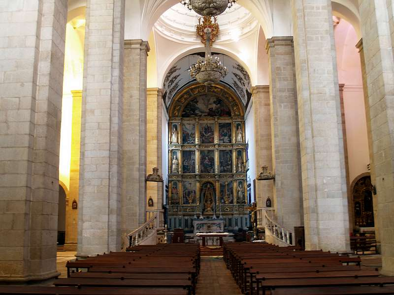 intérieur de la cathédrale